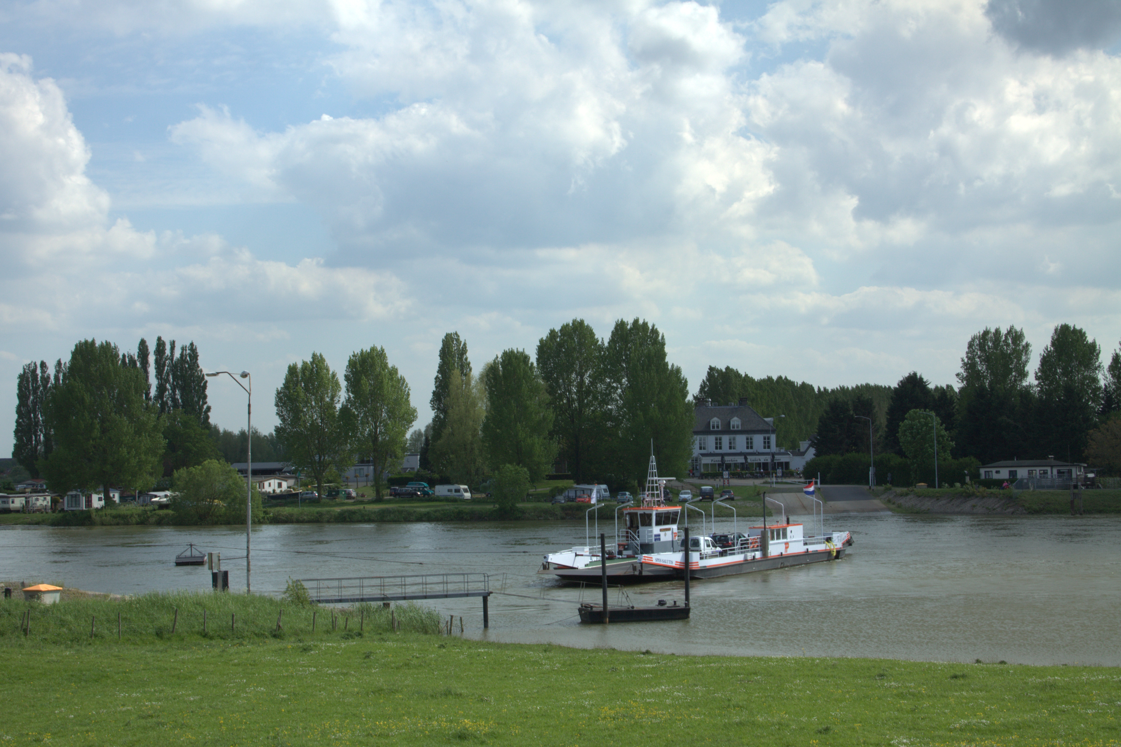 Zicht op het schip SPES SALUTIS van het Beusichemse veer over de rivier de Lek tussen Beusichem en Wijk bij Duurstede. Ook zicht op een deel van het hotel en restaurant ‘t VeerHuys aan de Veerweg, Beusichem